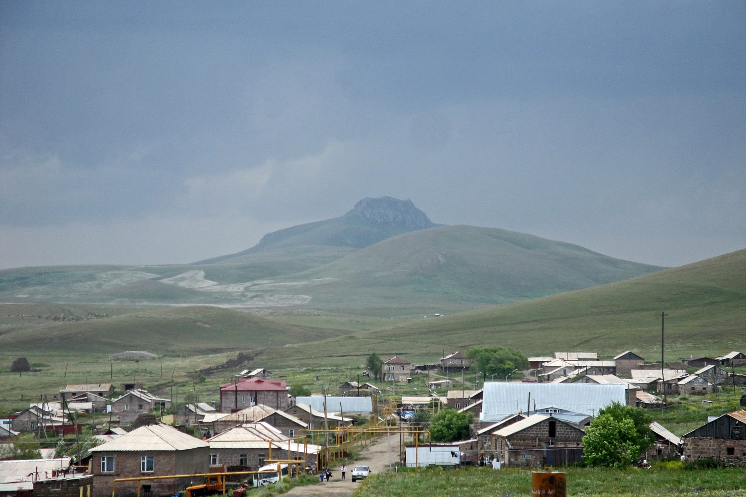 Деревня Лернапар, вдали гора Цахкасар